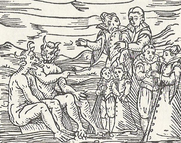 Hexenkinder werden auf dem Sabbat vorgestellt. »Das Kind im Hexenglauben«, Holzschnitt aus Francesco-Maria Guazzos »Compendium maleficarum«, Mailand 1626. Kopiert aus: Nicole Bettlé: Wenn Saturn seine Kinder frisst: Kinderhexenprozesse und ihre Bedeutung als Krisenindikator. Bern 2013. S. 81.